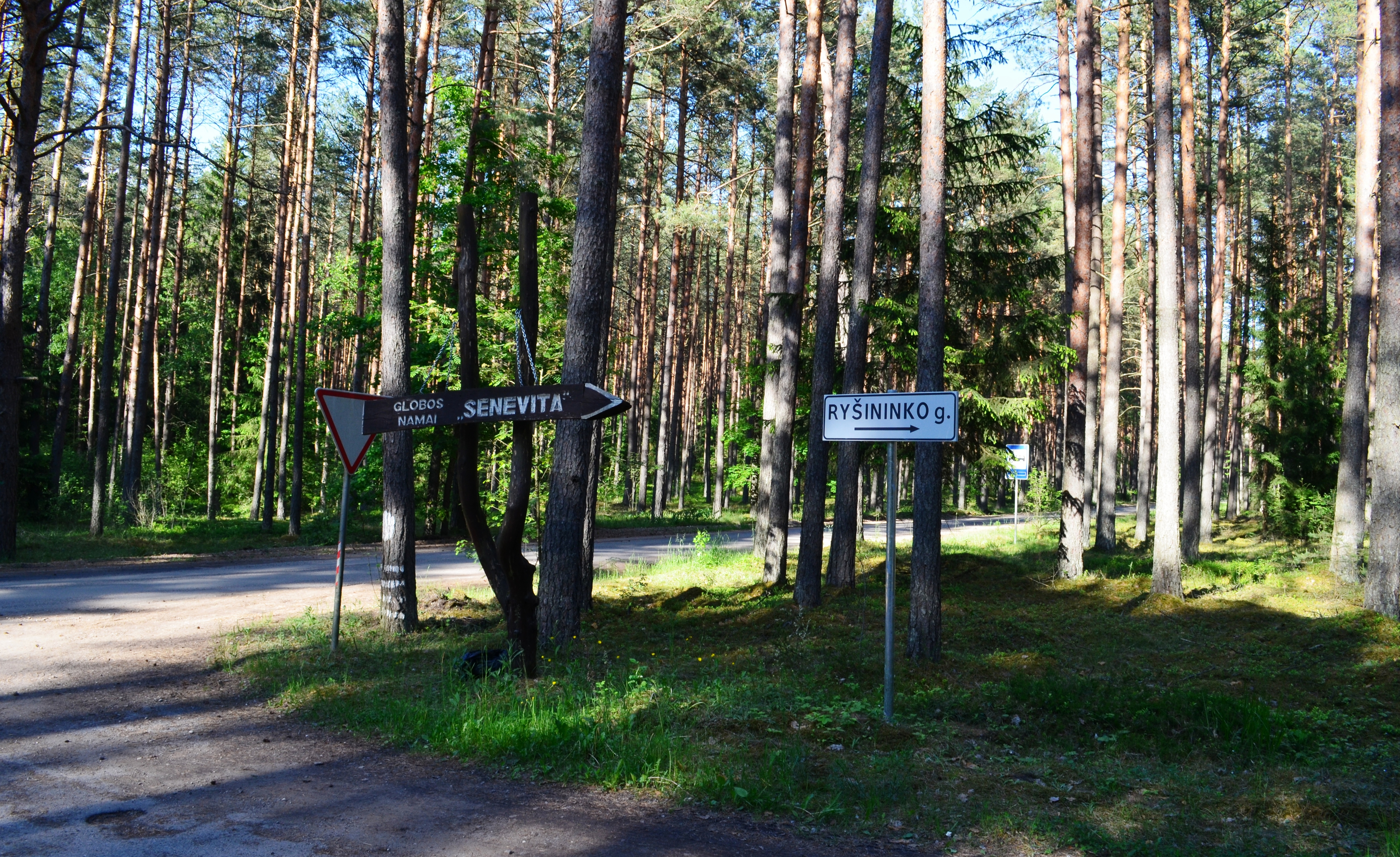 Posūkis į Ryšininką, Vilniaus raj.